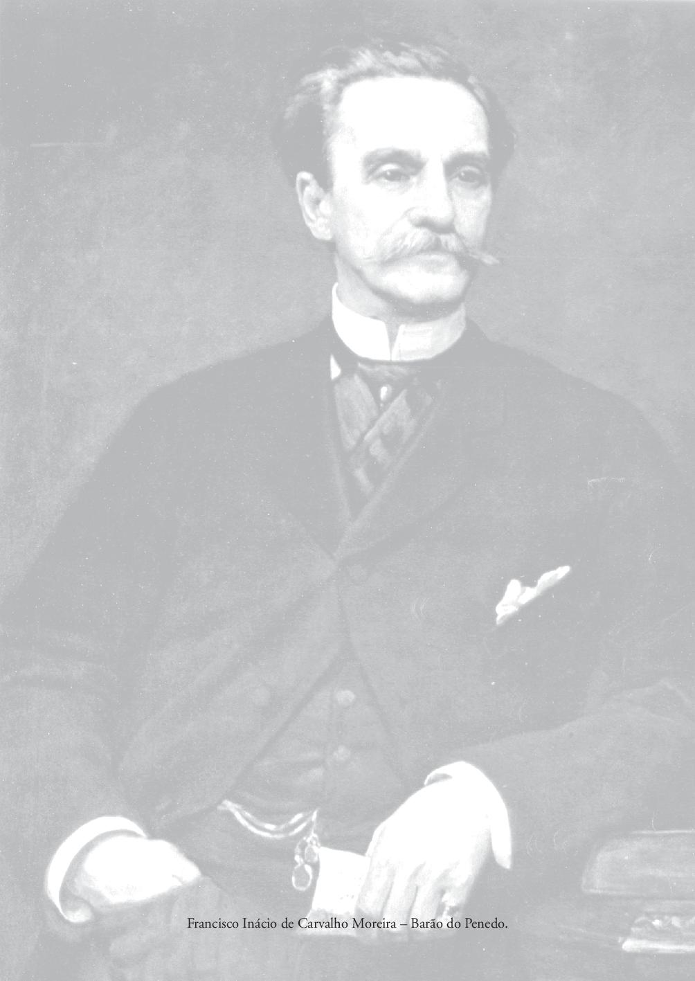 Barão de Penedo por Ethel Mortlock Min.